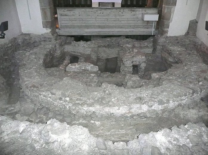 St.-Laurenz-Basilika, Ausgrabungen